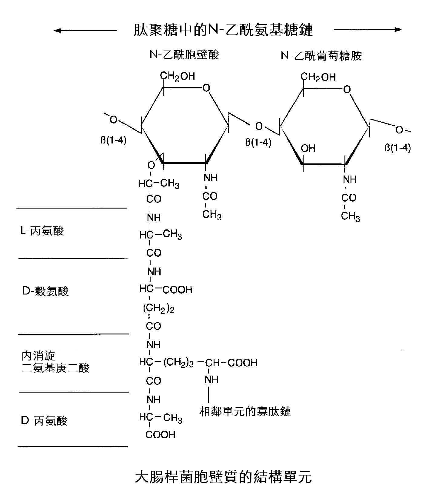 來自德文維基